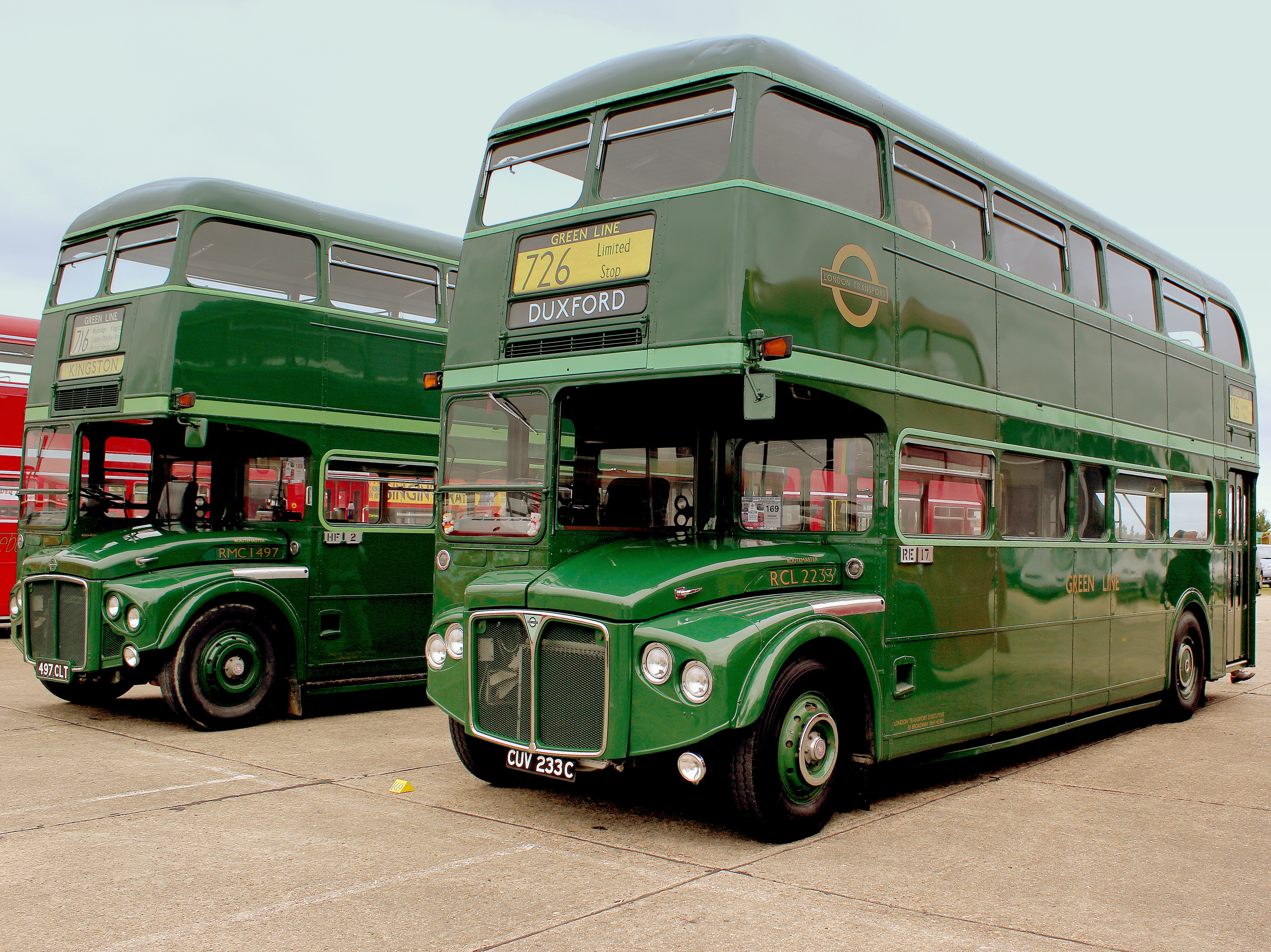 GREEN LINE AEC RCL/RMC ROUTEMASTERS AT SHOWBUS DUXFORD SEP 2012